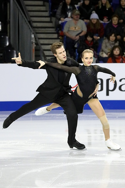 Виктория Синицина и Никита Кацалапов в Финале Гран-при 2018/2019